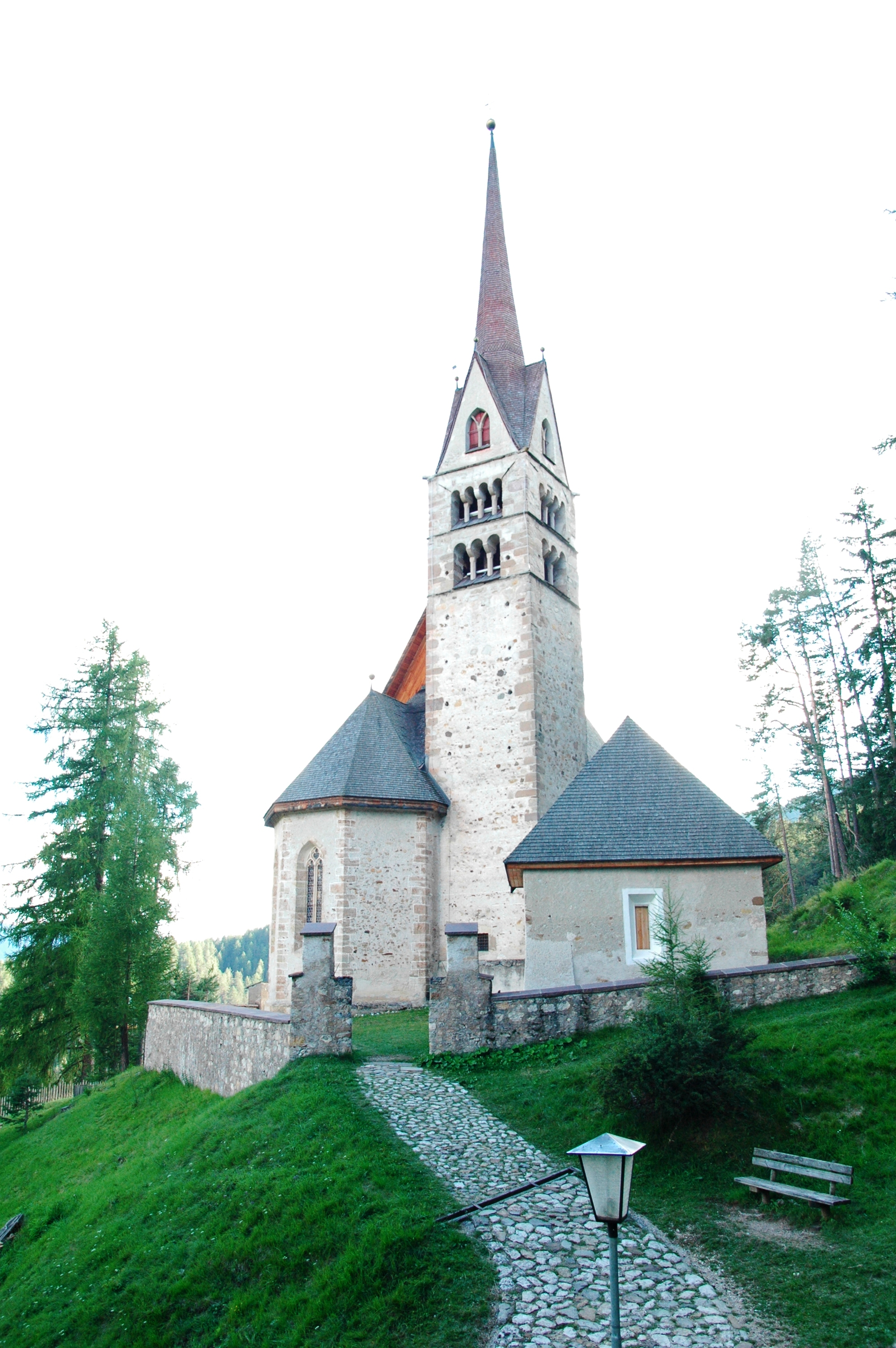 S. Giuliana